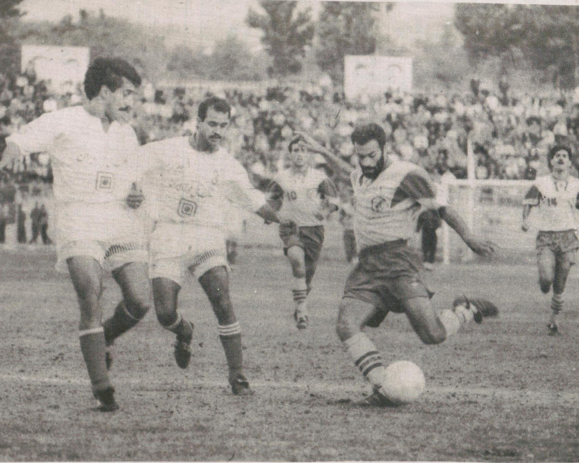 سپاهان و پرسپولیس سال 1375